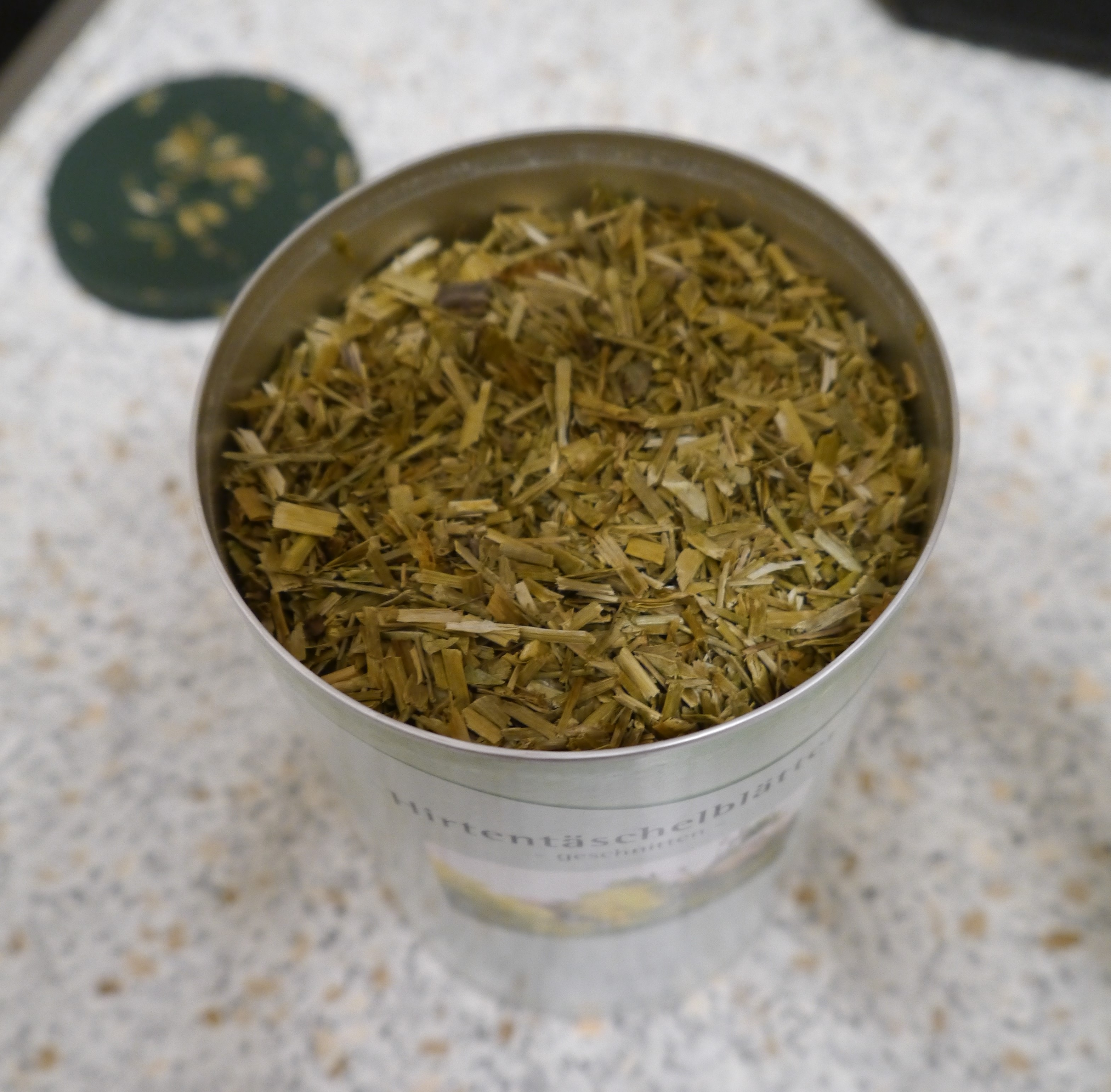 Hirtentäschel-Tee 2014, Hörmannhof.